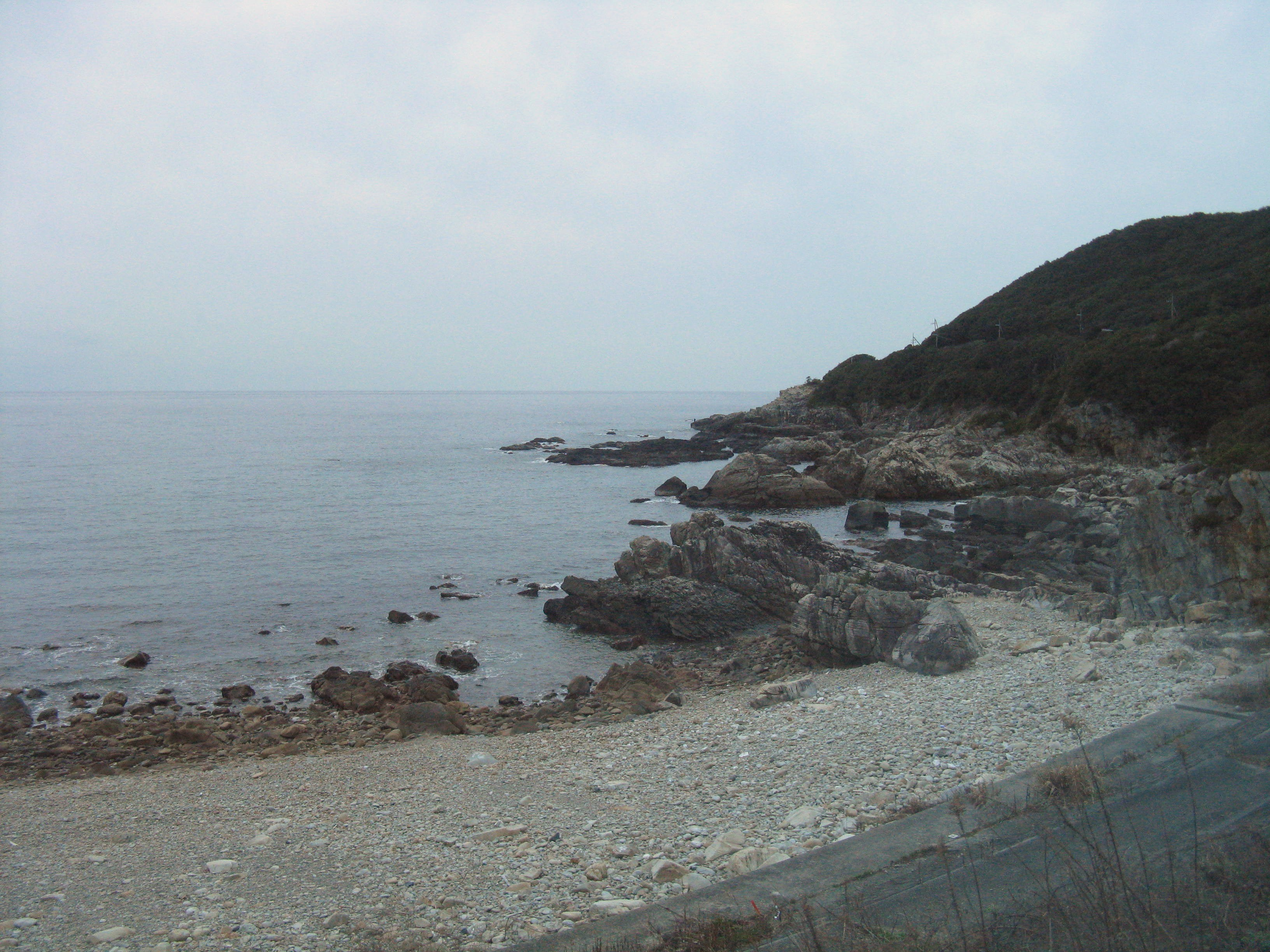 和歌山県西牟婁郡すさみ町見老津の道の駅イノブータンランド・すさみから望み海岸。